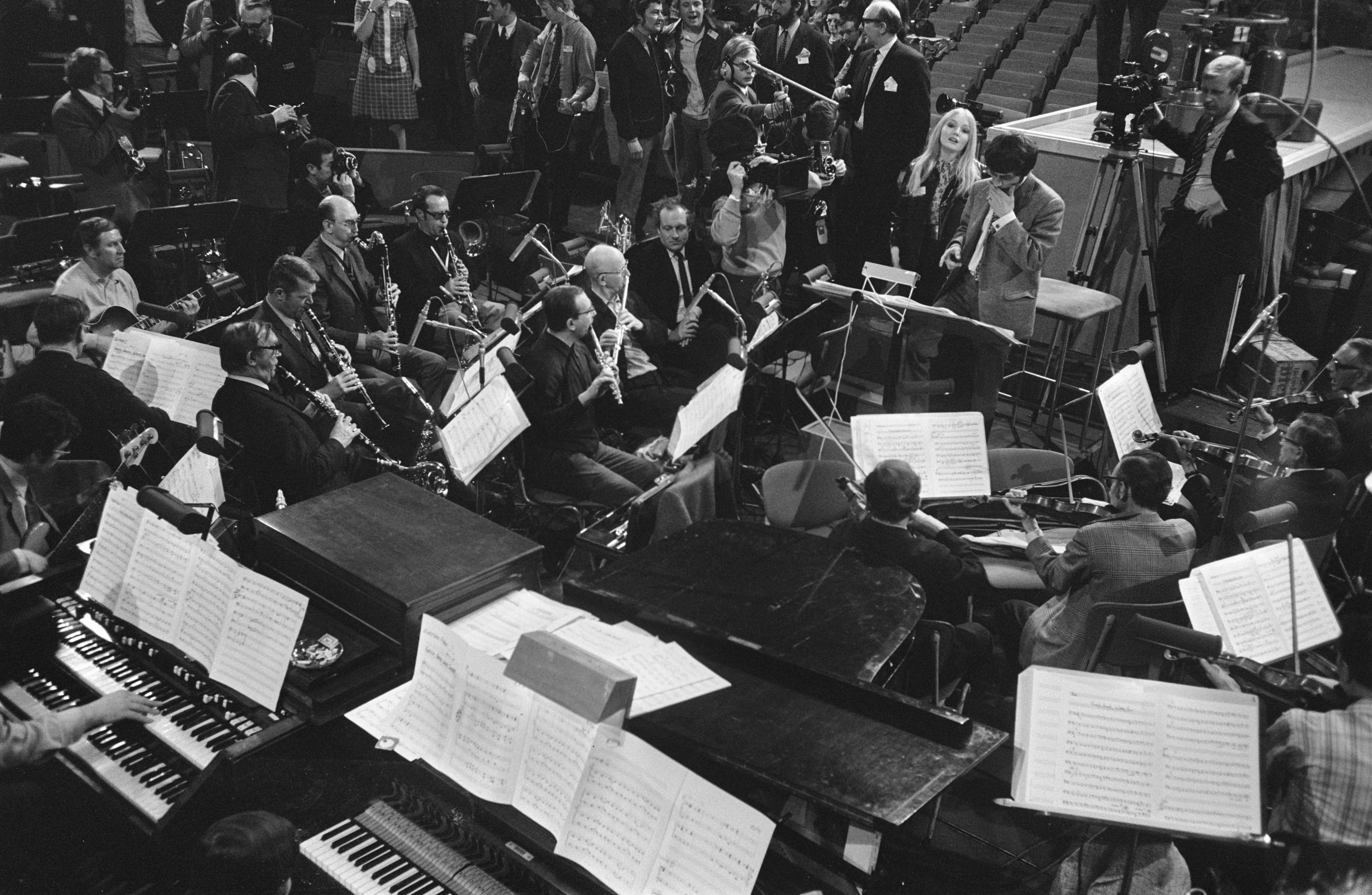 Collectie / Archief : Fotocollectie Anefo Reportage / Serie : Eurovisie Songfestival 1970 in RAI te Amsterdam Beschrijving : Repetities. Orkest met Mary Hopkin en Engelse dirigent Johnny Arthey? Datum : 19 maart 1970 Locatie : Amsterdam Trefwoorden : artiesten, songfestivals, zangers Persoonsnaam : Hopkin, Mary Instellingsnaam : Eurovisie Song Festival Fotograaf : Koch, Eric / Anefo Auteursrechthebbende : Nationaal Archief Materiaalsoort : Negatief (zwart/wit) Nummer archiefinventaris : bekijk toegang 2.24.01.05 Bestanddeelnummer : 923-3652